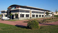 Parque Tecnológico Álava, lugar donde cada vez se concentran más empresas con el objetivo prioritario de colaboración y mejora tecnológica. con el objetivo prioritario de colaboración y mejora tecnológica.